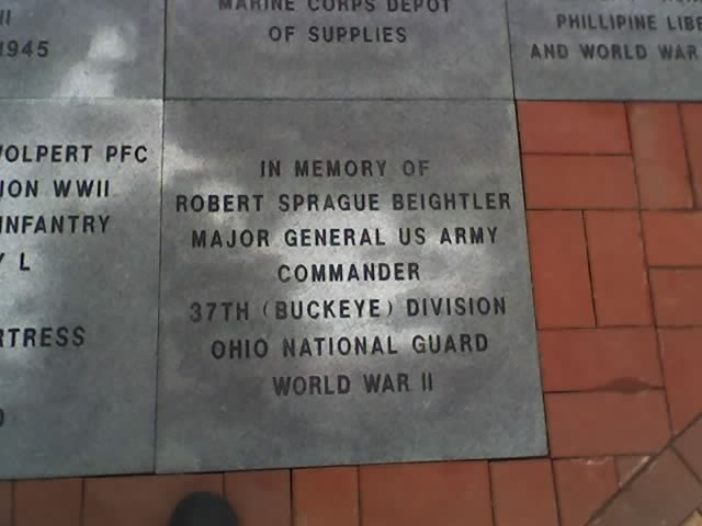 Beightler, Marker